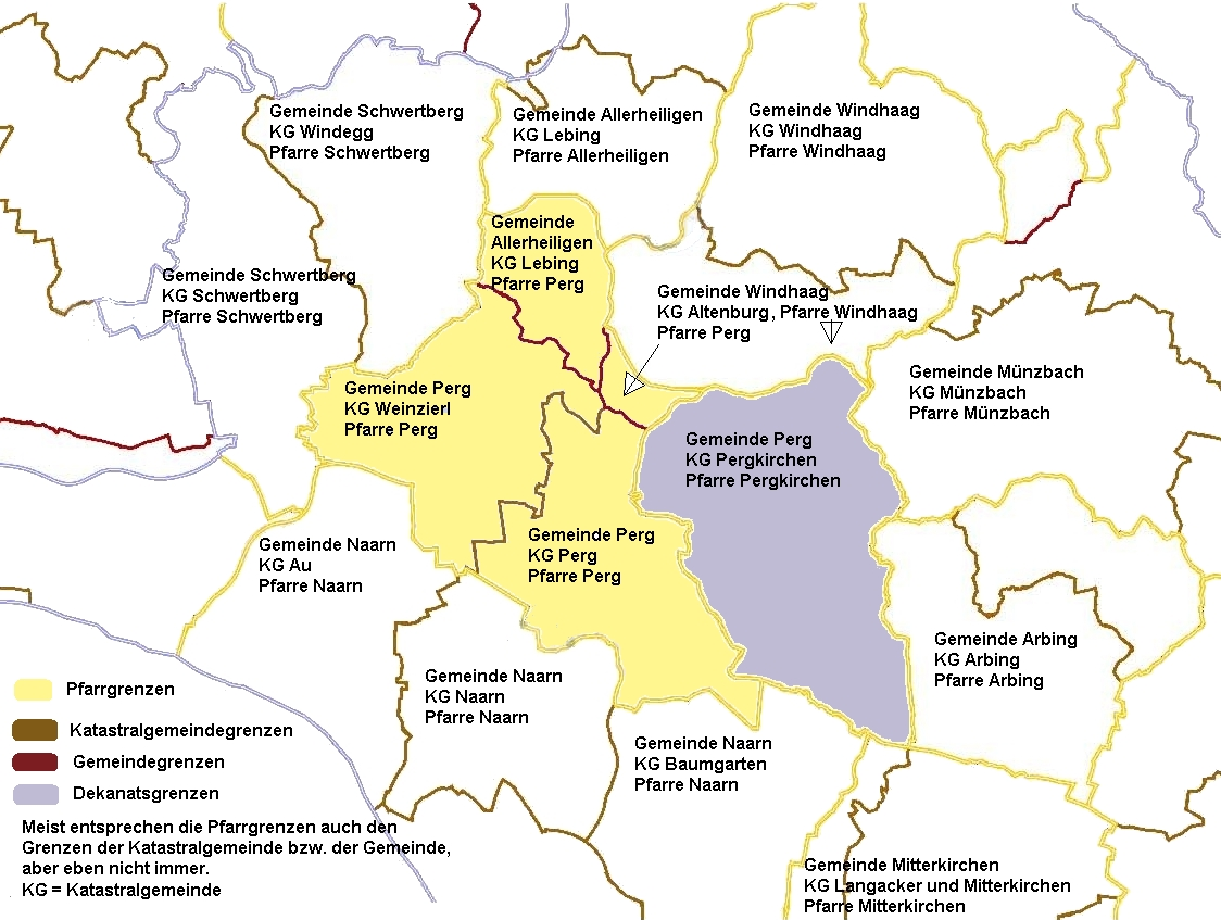 Die Lage der Gemeinde-, Katastralgemeinde- und Pfarrgrenzen in der Stadtgemeinde Perg